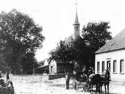 Fotografie von Wahlschied um 1890